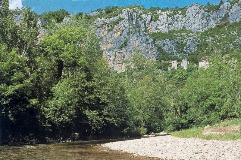 Date du cliché : septembre 2000.